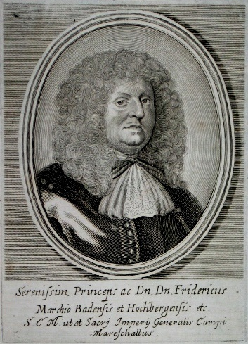 Friedrich VI. von Baden-Durlach (Kupferstich)